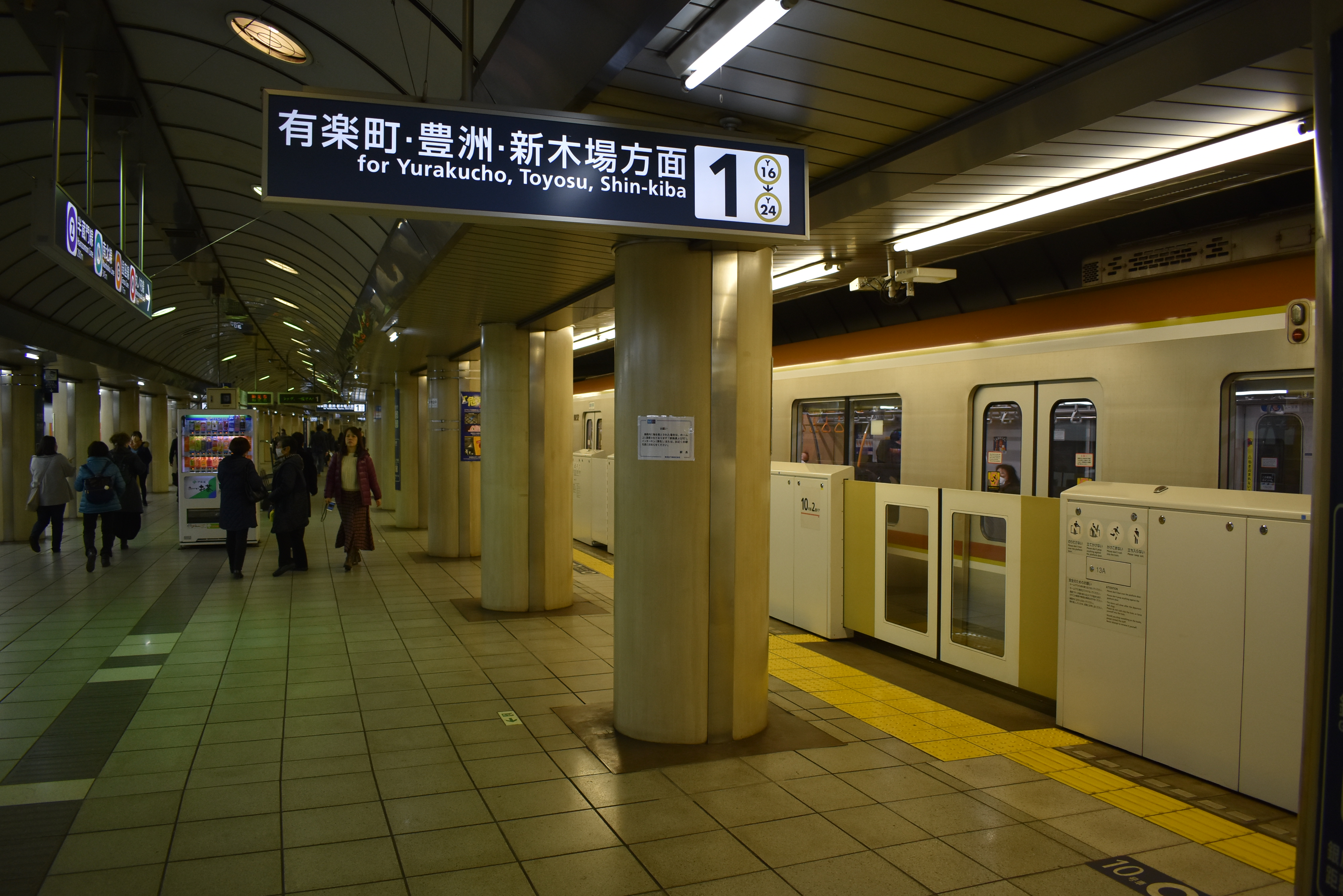 有楽町線 永田町駅